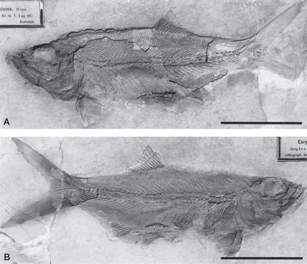 Holotype of Eurycormus speciosus Wagner, 1863, BSPAS V510. Tithonian, Eichsta¨ tt, Bavaria. A –– part; B –– counterpart. Scale equals 5 cm.